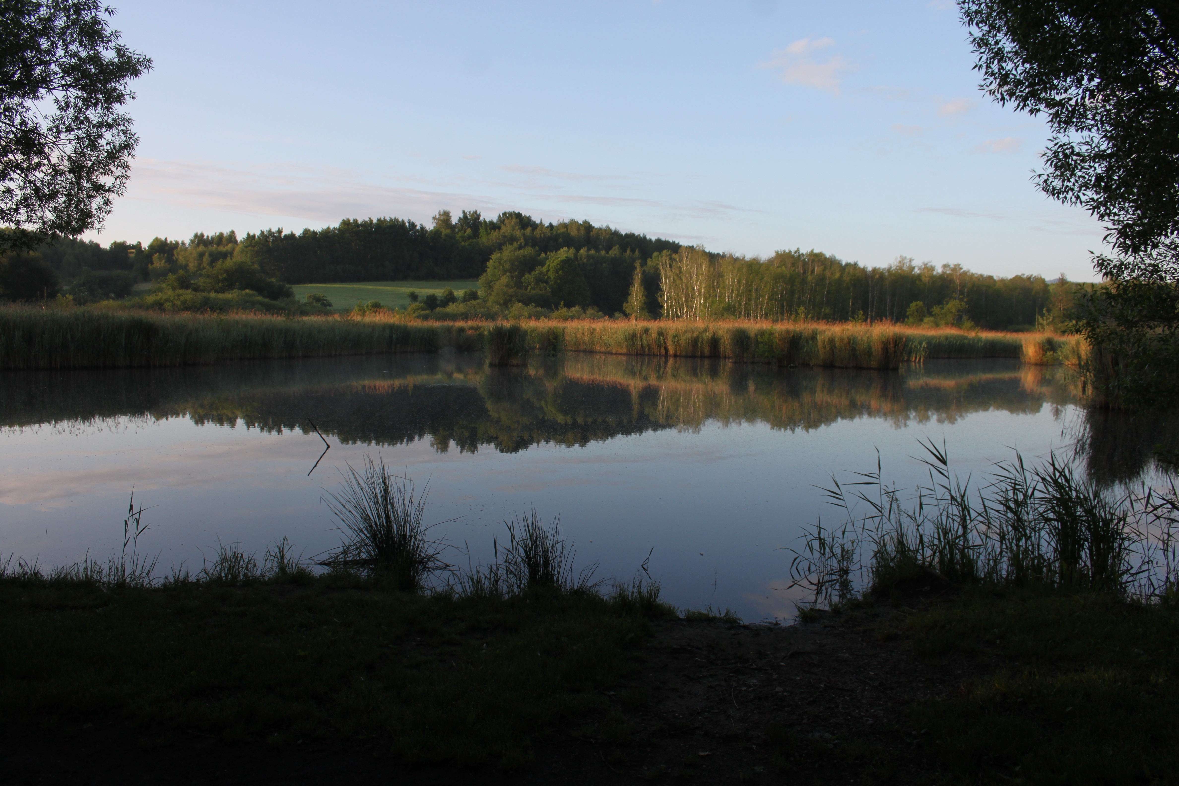 PR Vidnavské mokřiny (Nature reserve)